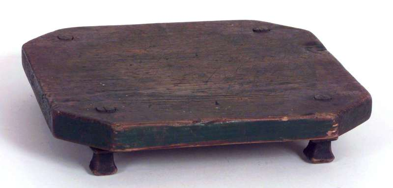 Ostefat fra Nordland, antakelig laget i 1812, med fat i furu og føtter av bjørk. Innskrift: KMS P 1868 // OLK OD / 1812. Foto: Anne-Lise Reinsfelt / Norsk Folkemuseum NF.1908-0282.